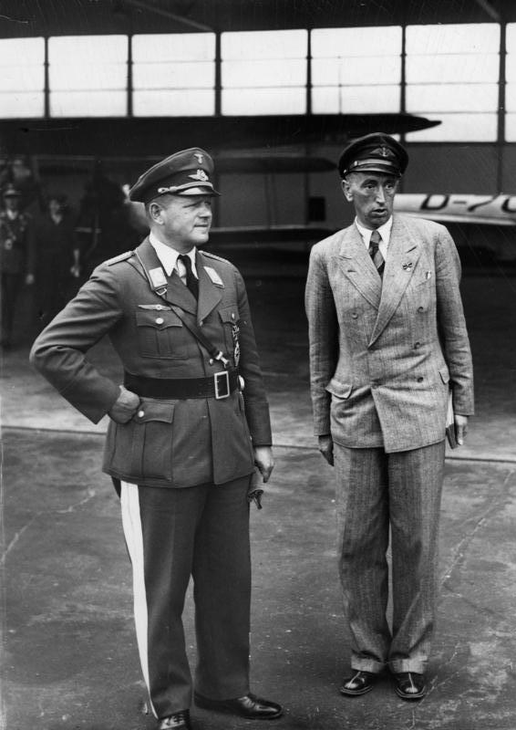 Berlin, Europaflug, Erhard Milch, Theo Osterkamp Zwischenlandung der deutschen Teilnehmer zum Europaflug 1934 in Tempelhof. Staatssekretär [Erhard] Milch im Gespräch mit dem Führer des deutschen Teams [Theodor] Osterkamp. Abgebildete Personen: Osterkamp, Theodor: Generalmajor, Ritterkreuz (RK), Luftwaffe, Orden Pour le mérite, Deutschland (GND 124745822) Milch, Erhard: Generalfeldmarschall, Ritterkreuz (RK), Luftwaffe, Deutschland (GND 118582402)